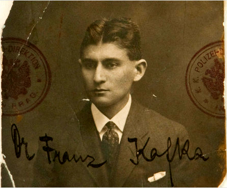 Franz Kafka, photo de passeport (publiée dans Le Siècle de Kafka isbn:9782858502523